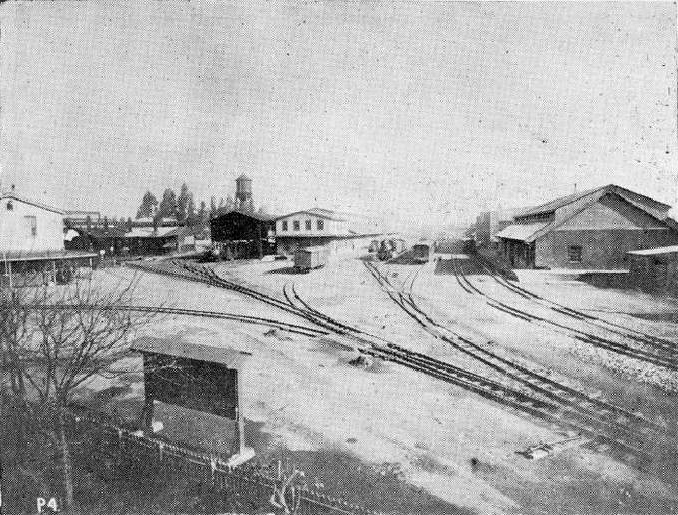 Estación y patios del Ferrocarril en Rancagua.